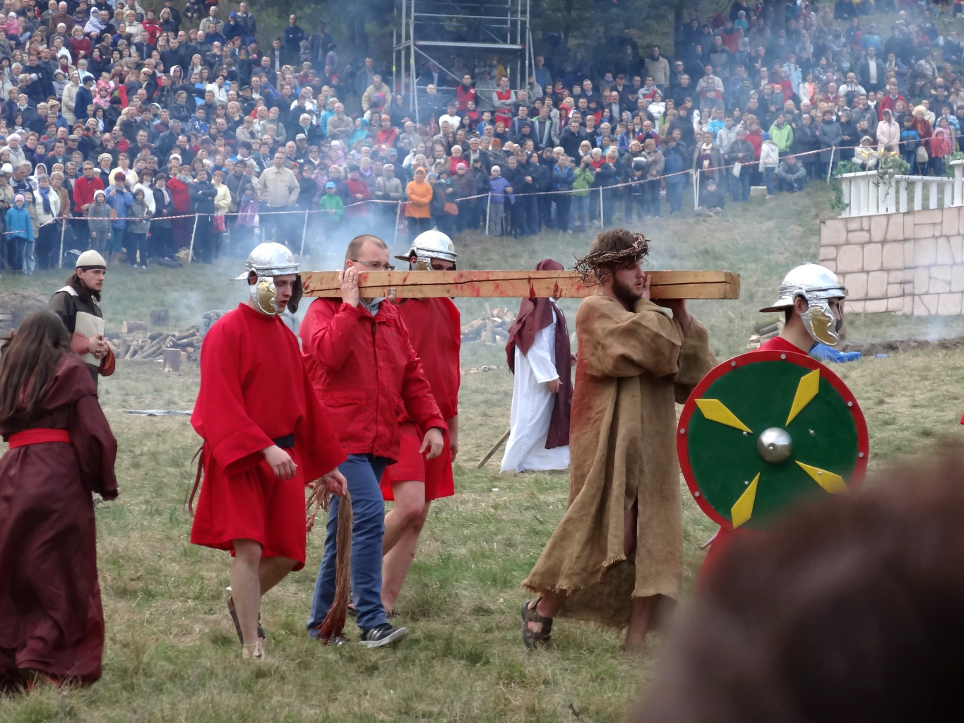 Misterium Męki Pańskiej w Dolinie Śmierci w Bydgoszczy 2014